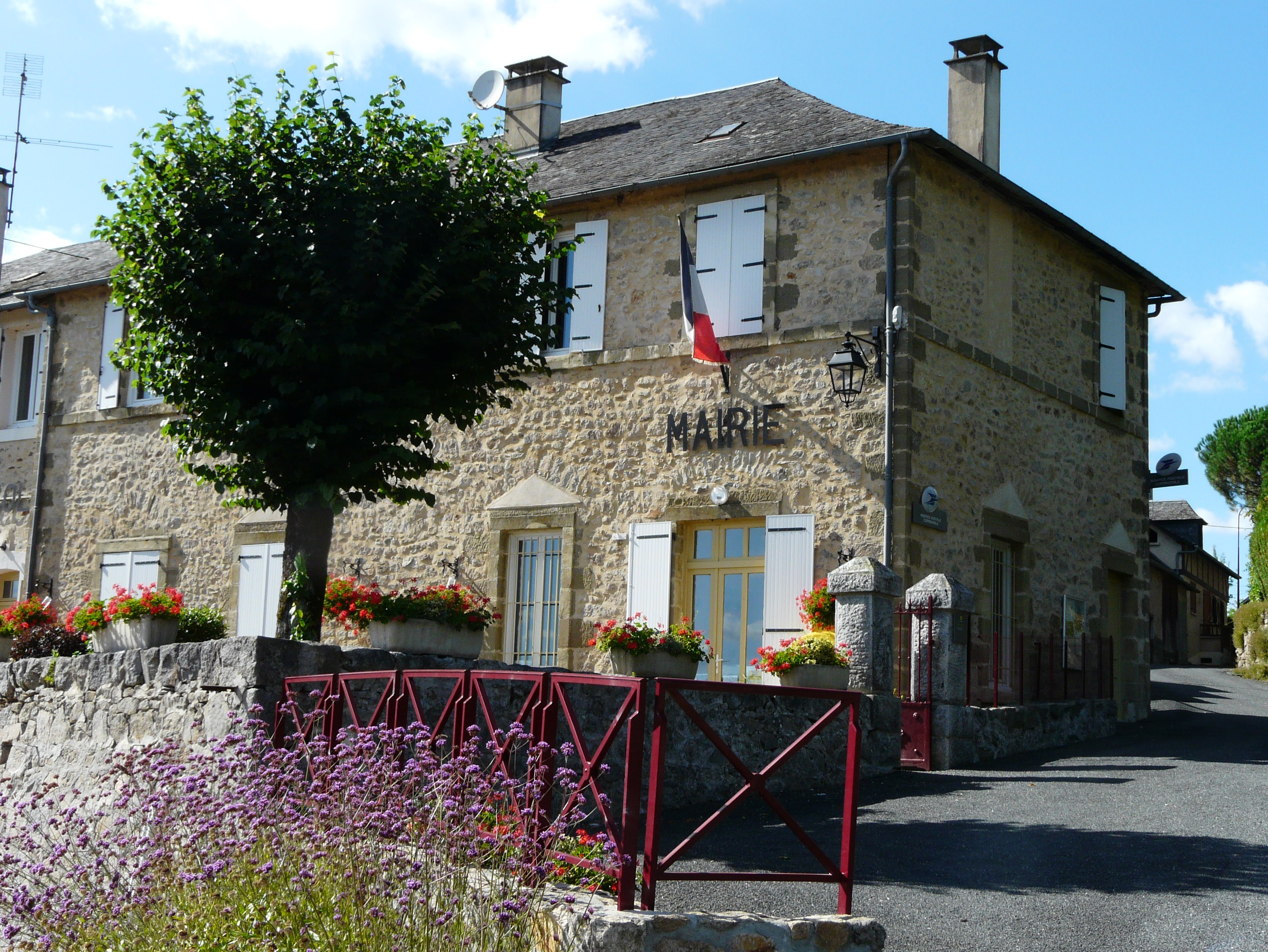 La mairie d'Estivaux, Corrèze, France.